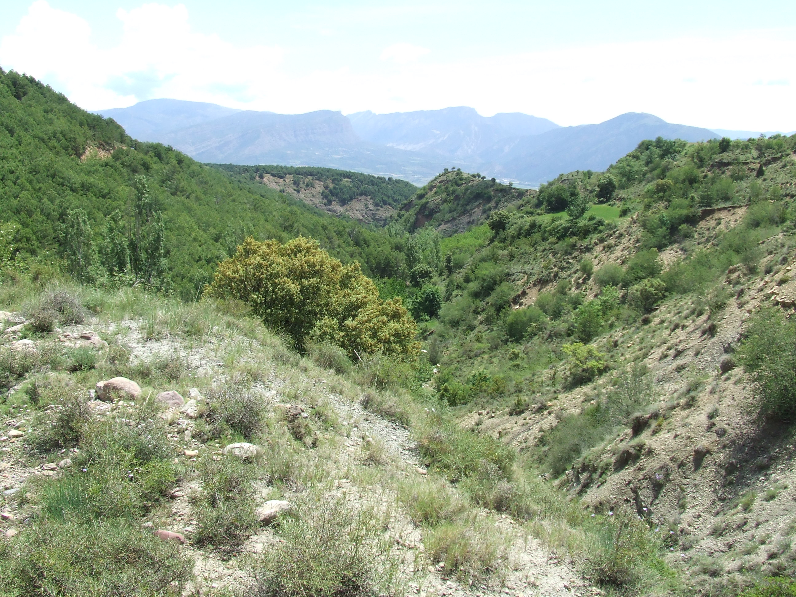 Vall del barranc de Fontfreda (Salàs de Pallars i Tremp, Pallars Jussà)